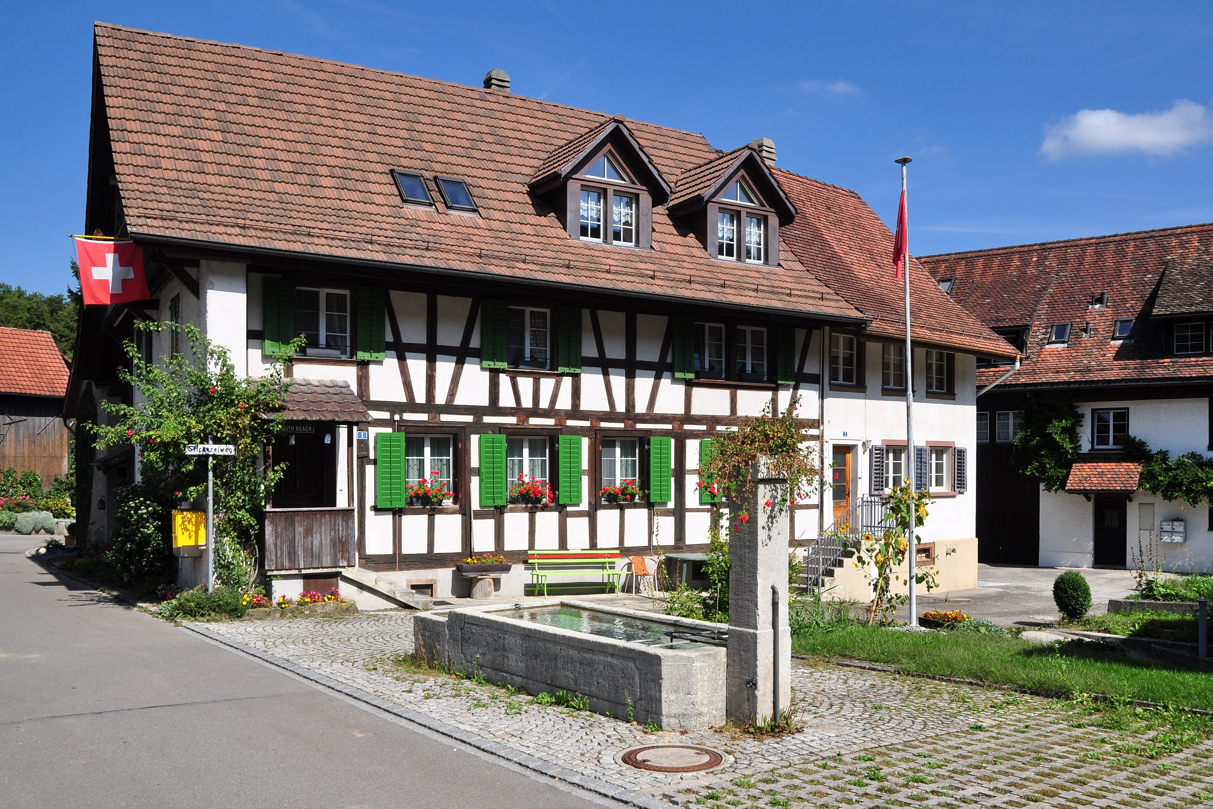 Zweidlen in Glattfelden (Switzerland)